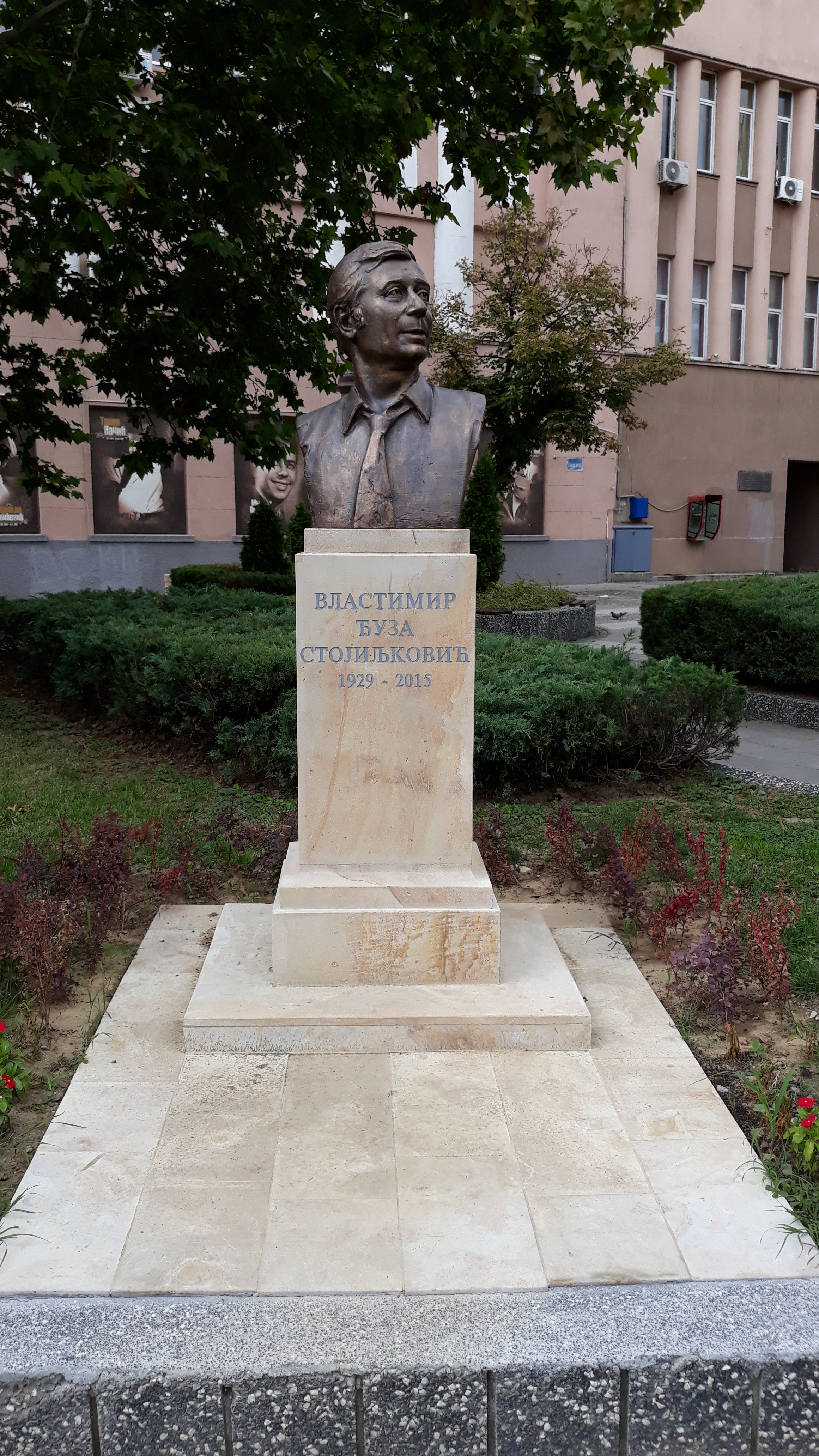 Бисте крушевачким глумцима испред зграде Културног центра у том граду.